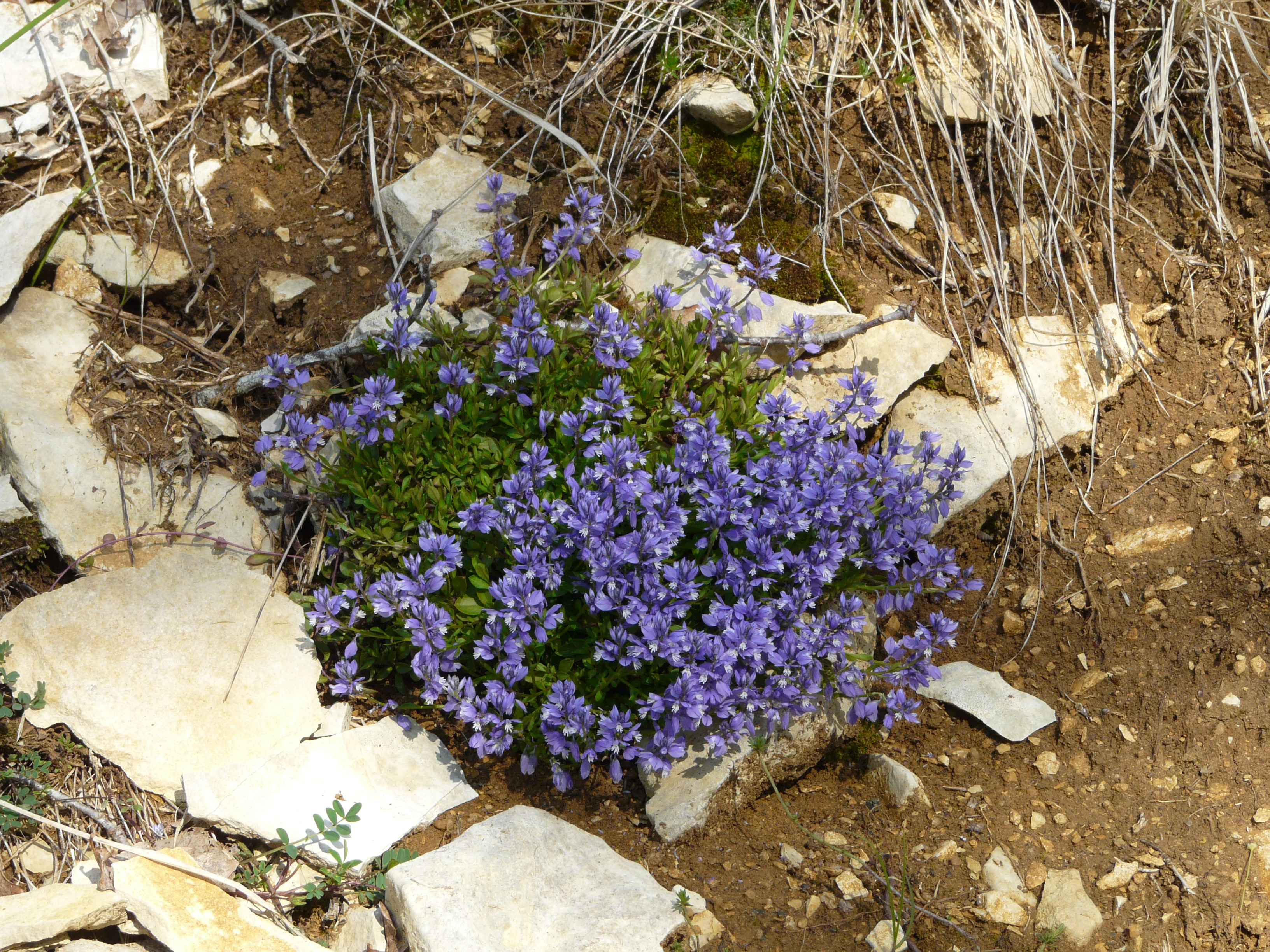 Polygala calcarea, La Cassagne, Dordogne, France